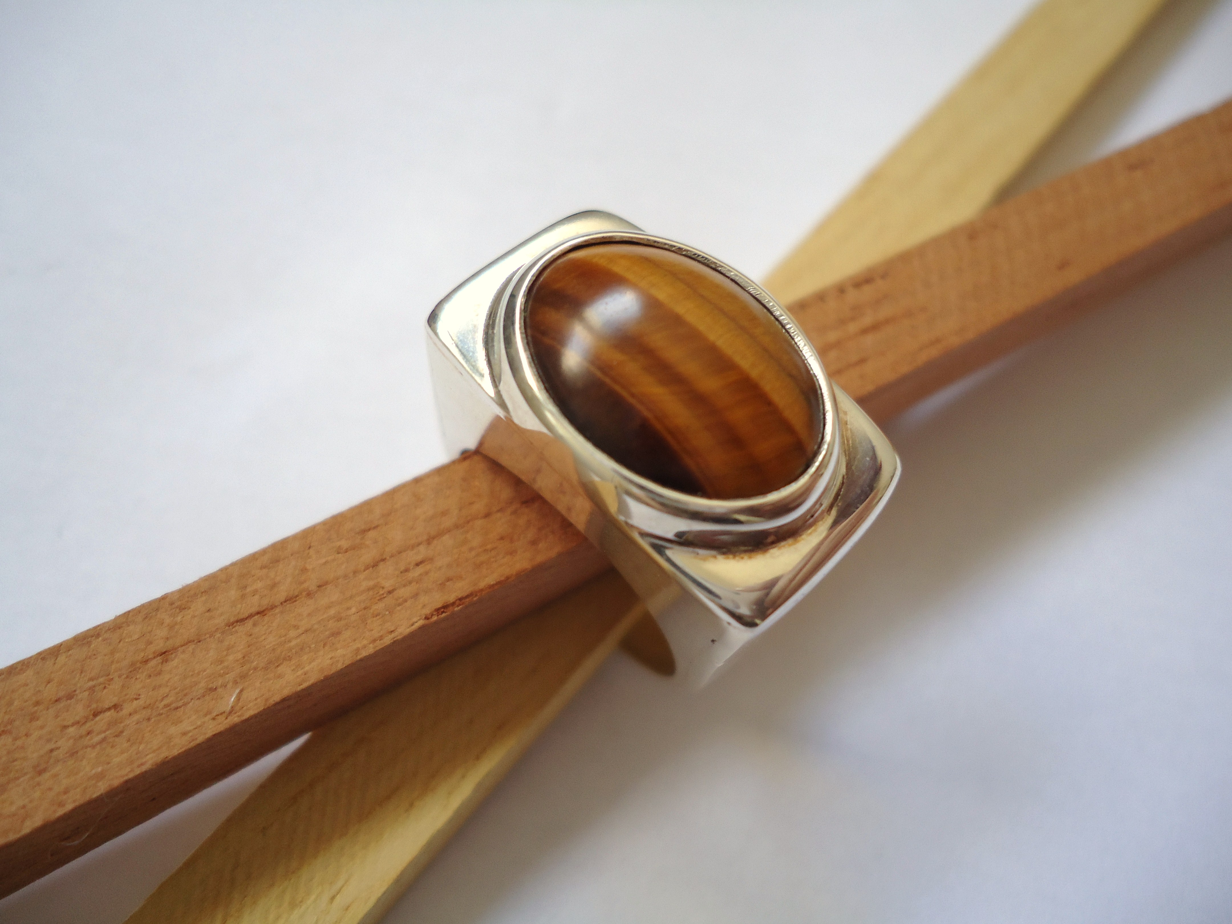 Anel de olho de tigre e prata.